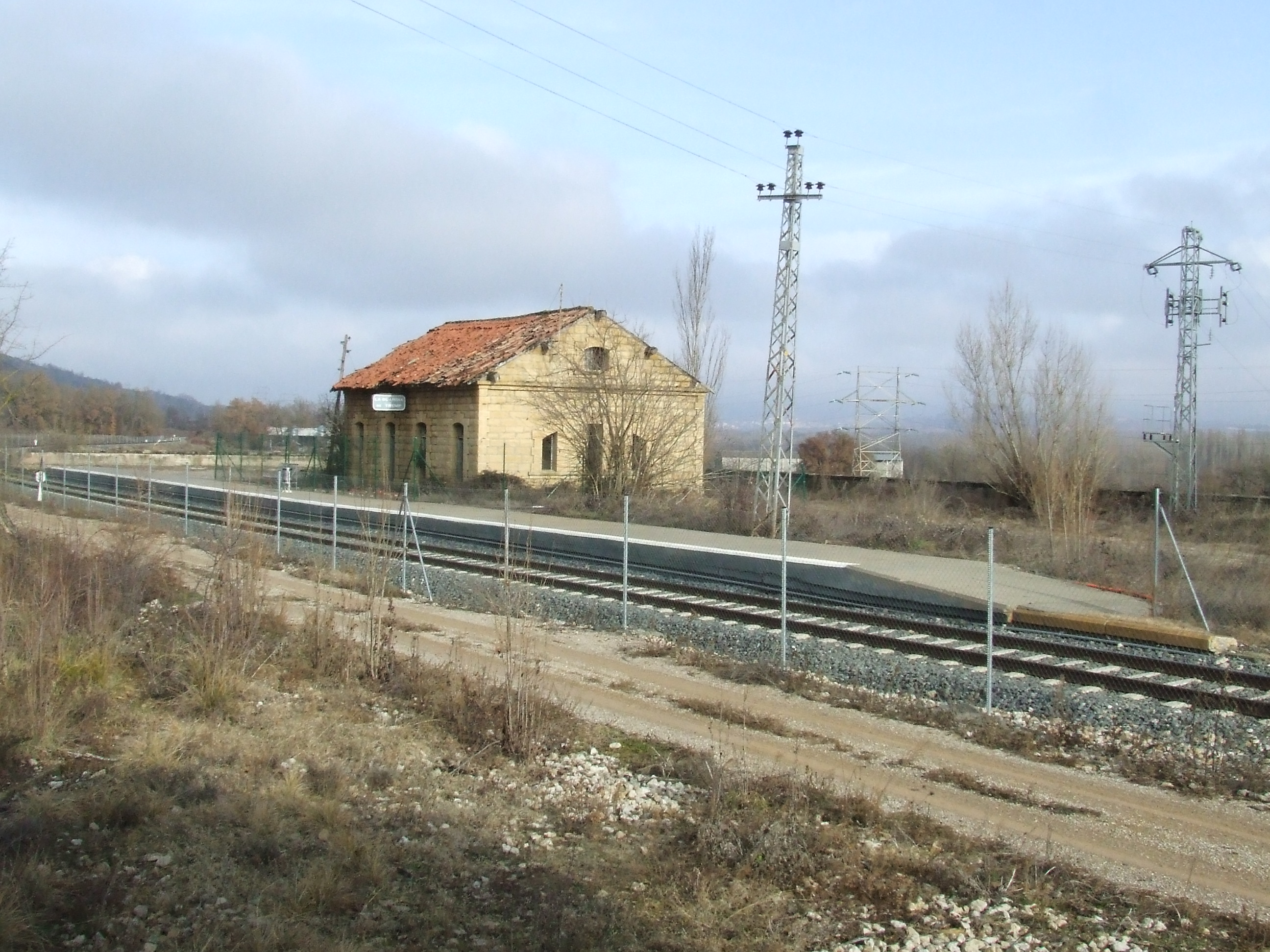 Estació de tren de Guàrdia de Noguera (Castell de Mur, Pallars Jussà)